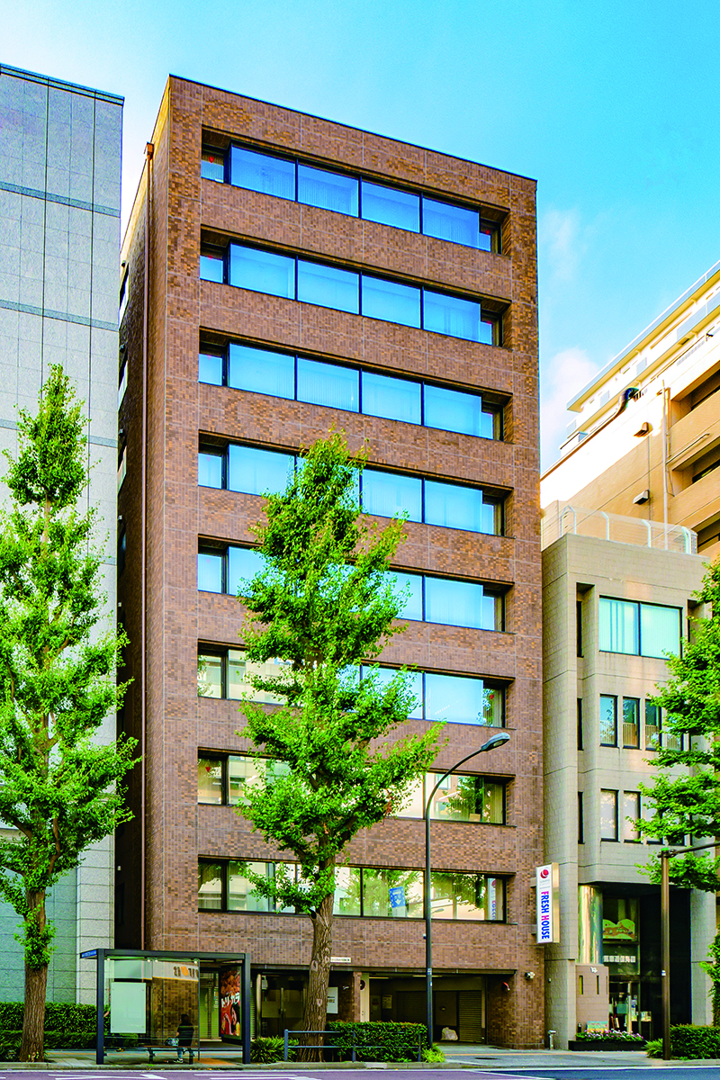 フレッシュハウス本社